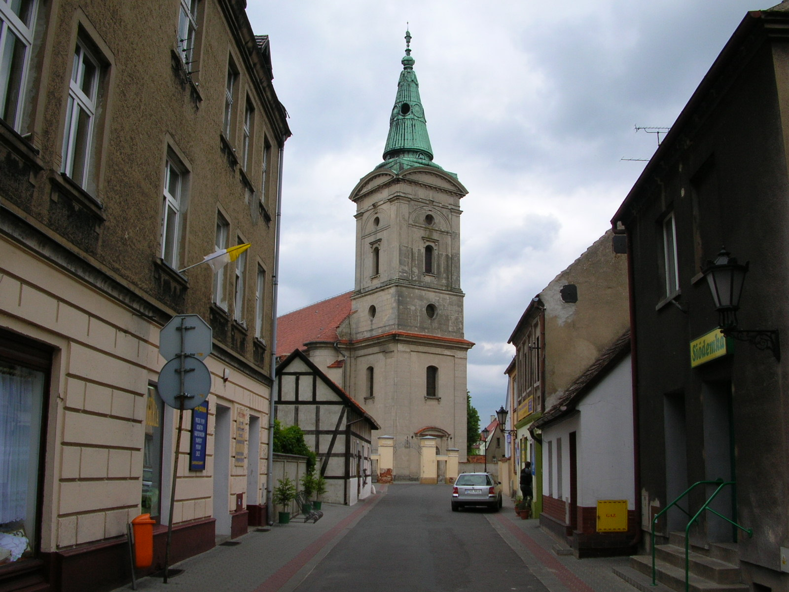 Poniec - Kościół pw. Narodzenia NMP Autor - Bartek Wawraszko